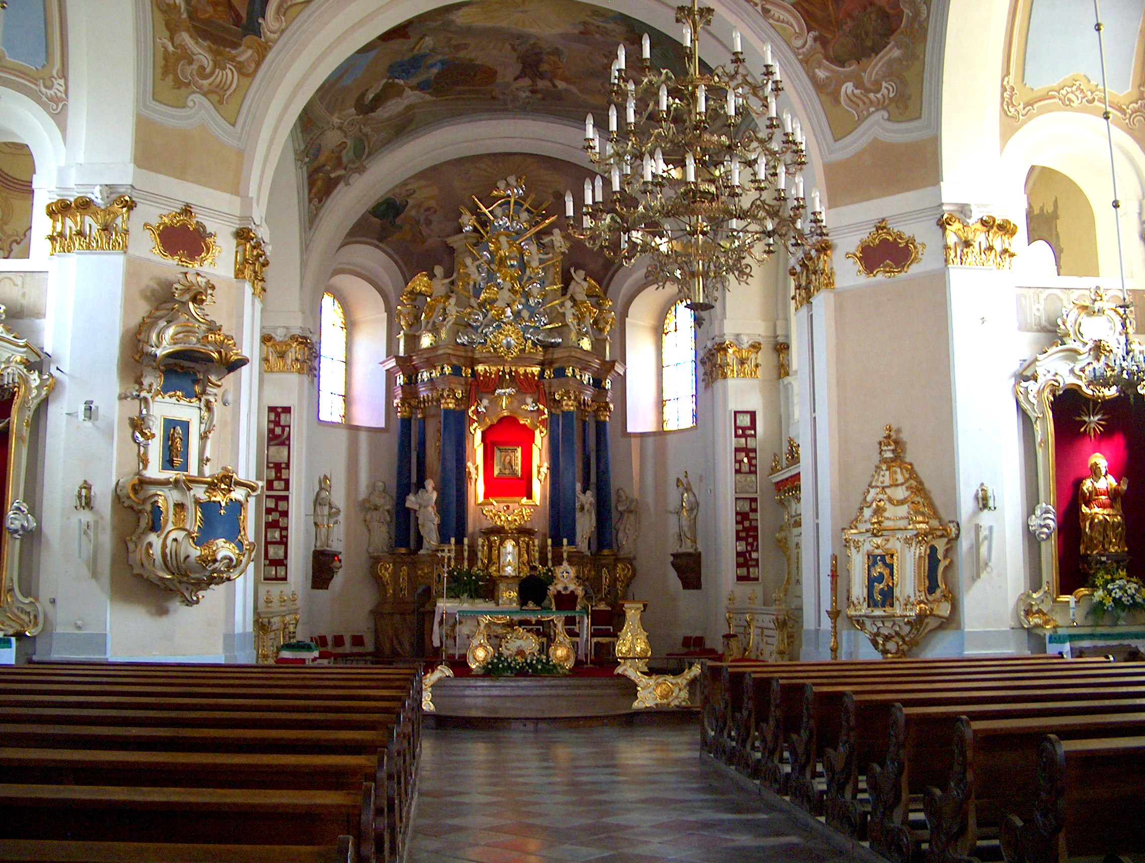 Rokitno, kościół par. p.w. Matki Boskiej Królowej Polski, 1746-1756